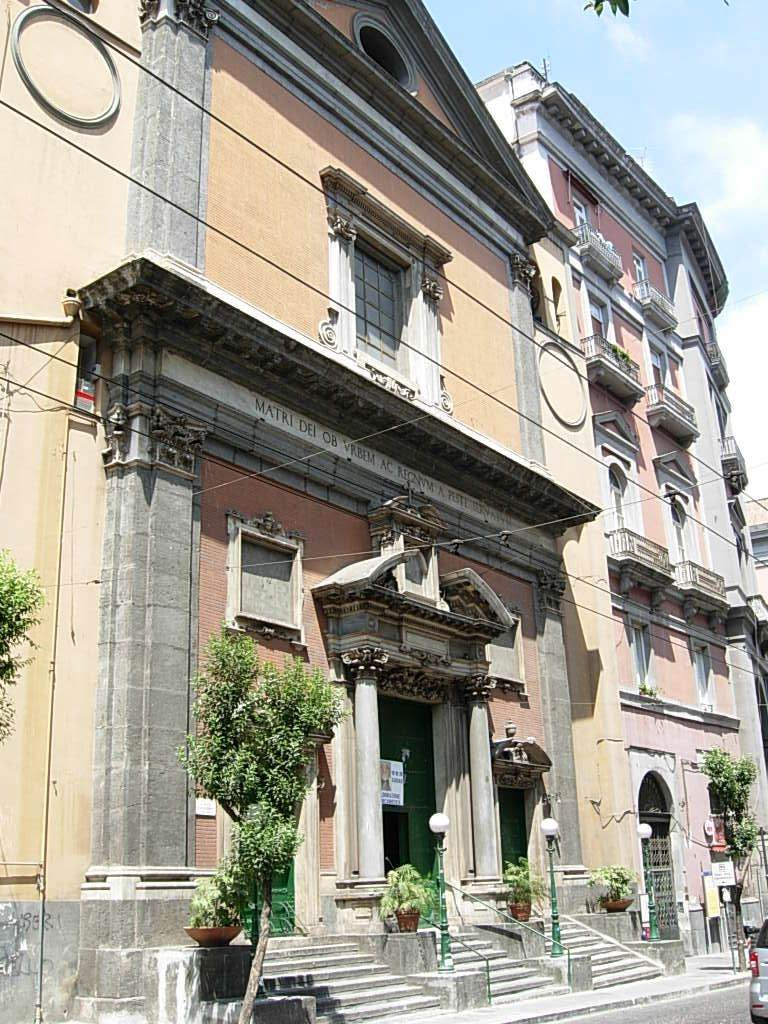 Chiesa di Santa Maria di Costantinopoli in Napoli Foto personale concessa in PD